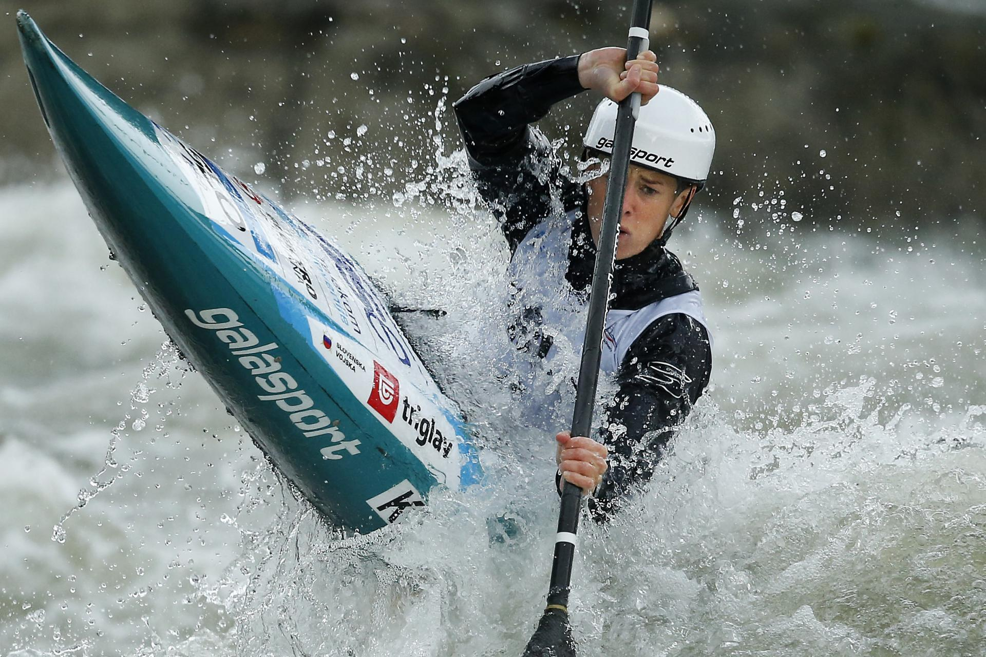 Tacen 2018